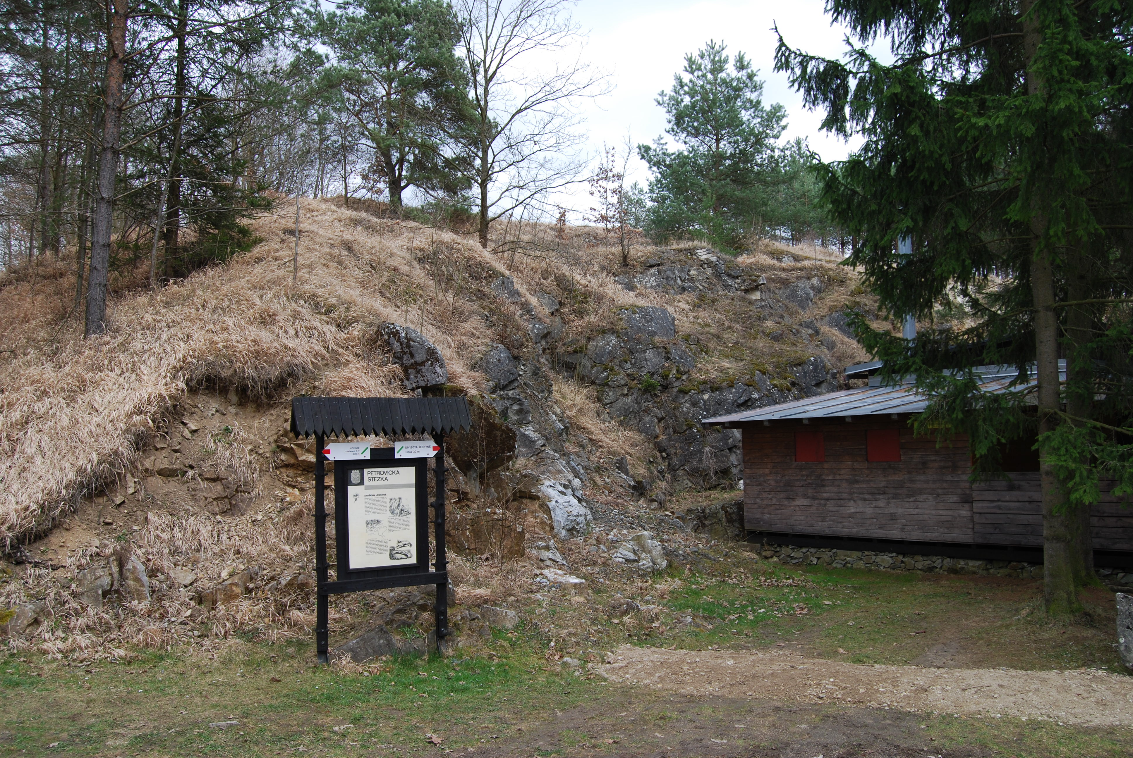 Okolí Divišovy jeskyně. Týnčany je malá vesnice, část obce Petrovice v okrese Příbram. Česká republika.